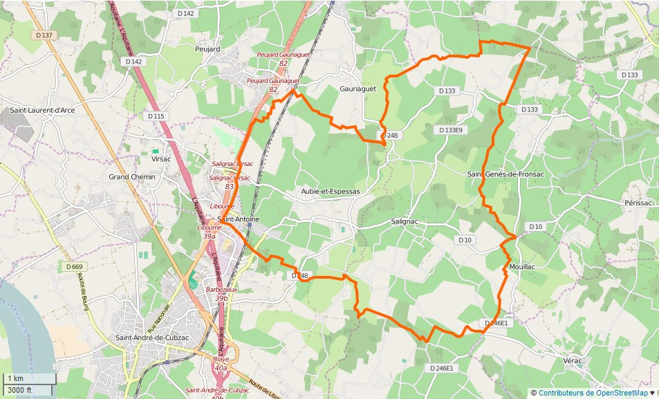 Val-de-Virvée Limite communale This map may be incomplete, and may contain errors. Don't rely solely on it for navigation.